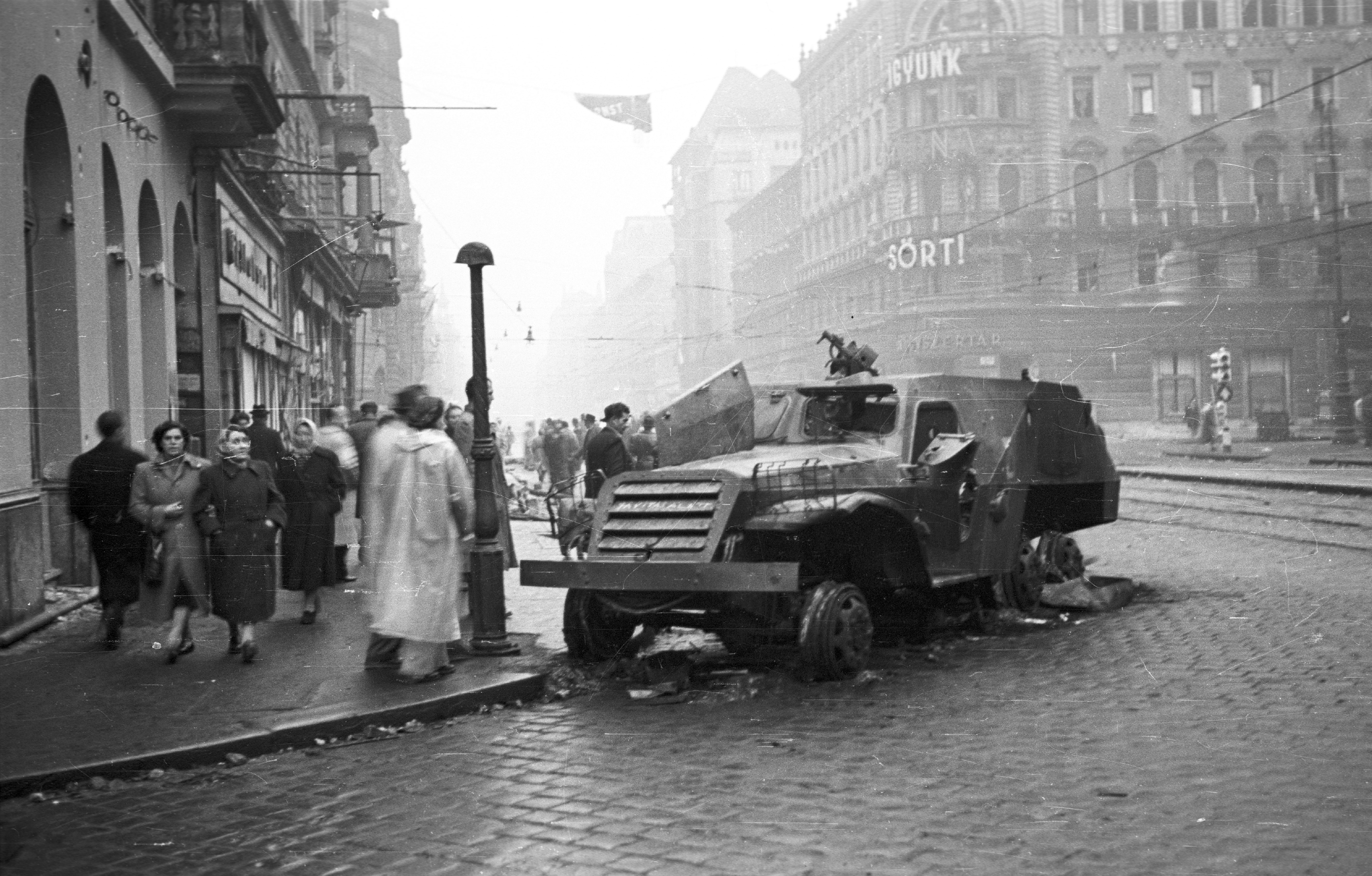 Rákóczi út az Akácfa utcától a körút felé nézve. Kiégett szovjet BTR-152 páncélozott lövészszállító jármű. Location: Hungary, Budapest VII. Tags: wreck, armoured car, combat vehicle, Soviet brand, label, Budapest, revolution Title: Rákóczi út az Akácfa utcától a körút felé nézve. Kiégett szovjet BTR-152 páncélozott lövészszállító jármű.